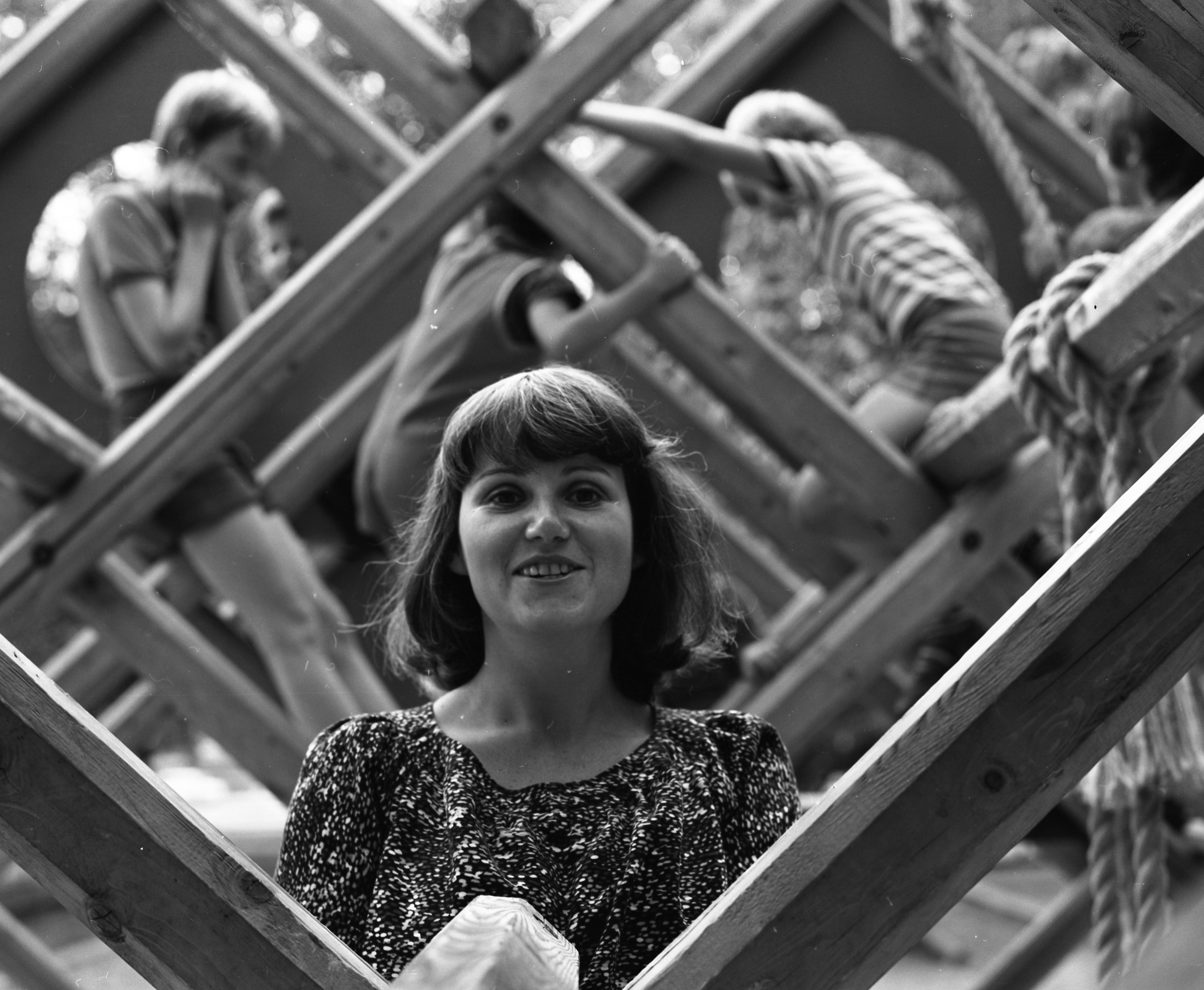 Detre Annamária színésznő. Location: Hungary Title: Detre Annamária színésznő.